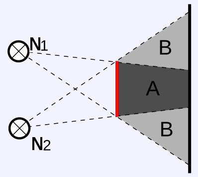 Kiswahili: kutokana na nimeiswahilisha